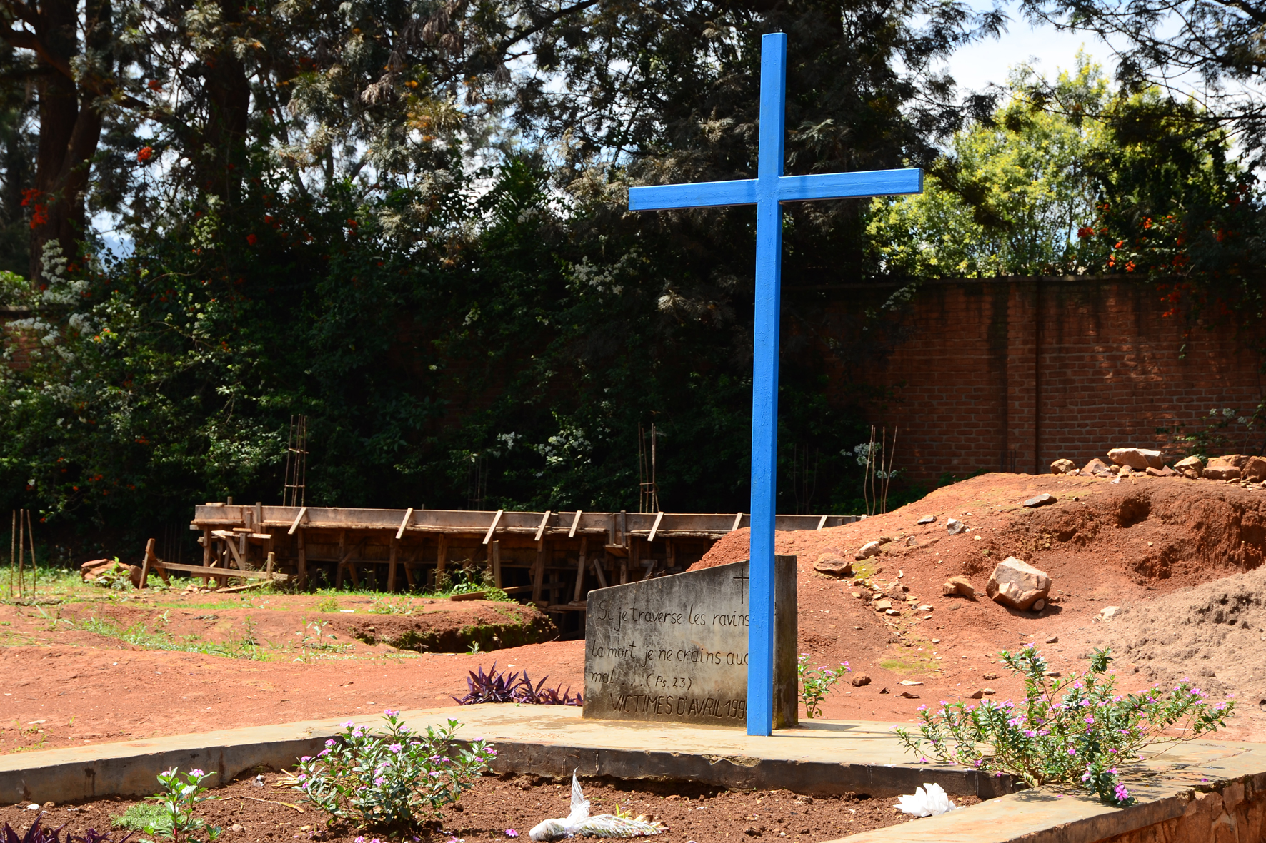 Mogiła ofiar masakry na Gikondo (misja pallotyńska) w kwietniu 1994 r.